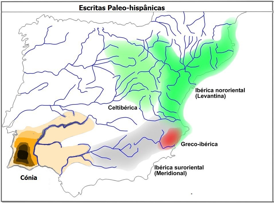 Mapa das escritas paleo-hispànicas